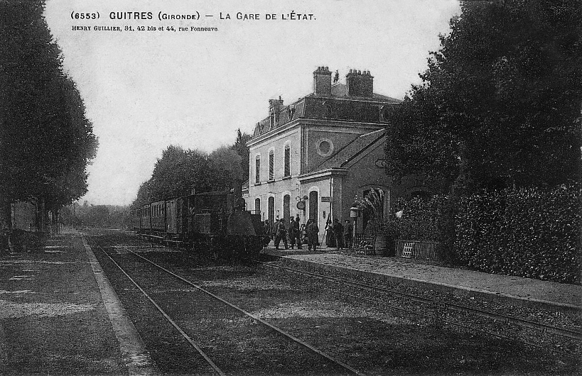 La gare de Guîtres au début des années 1900.